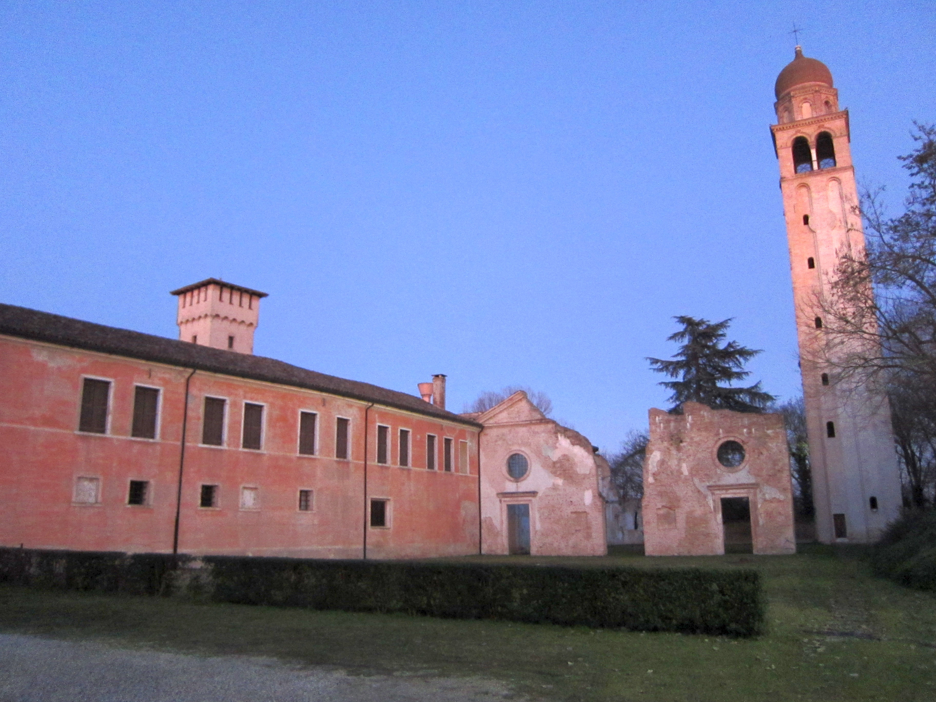 Abbazia Santa Maria del Pero, Monastier di Treviso, TV, Italien